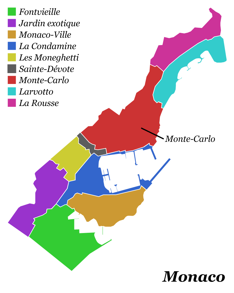 Quartier Monte-Carlo à Monaco